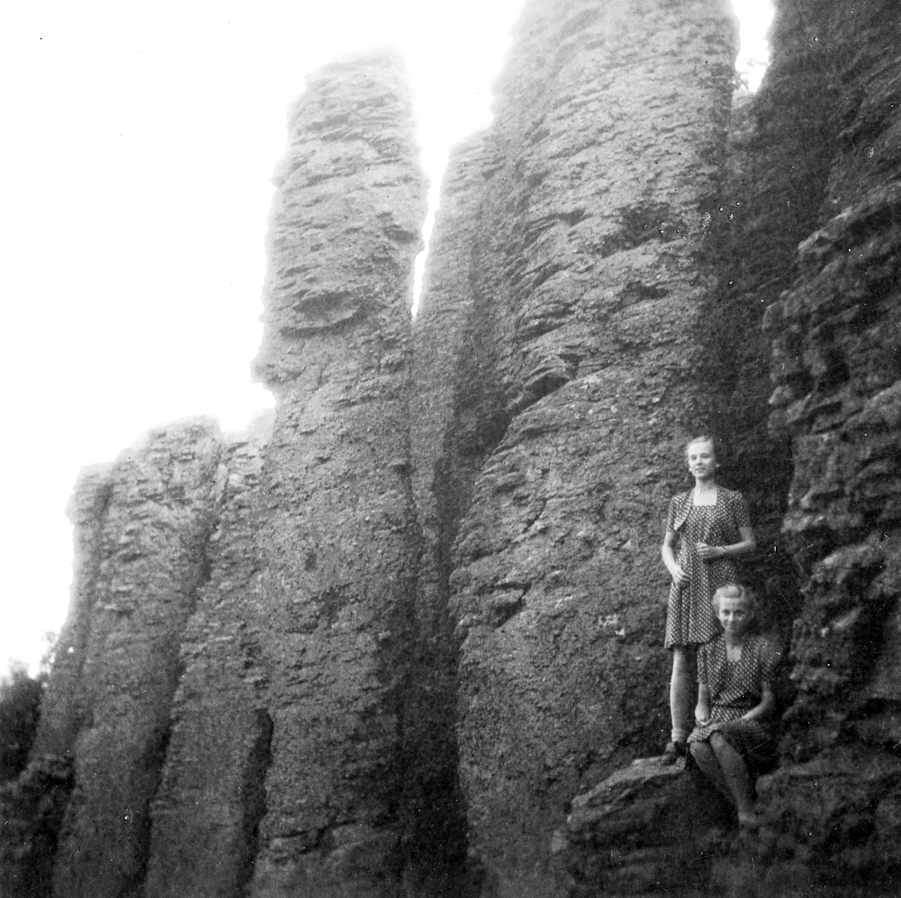 Szent György-hegy, bazalt oszlopsor. Location: Hungary Title: Szent György-hegy, bazalt oszlopsor.